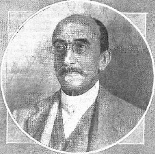 Fotografía del escritor español Eduardo López Bago publicada en 1914 con motivo de su regreso a España